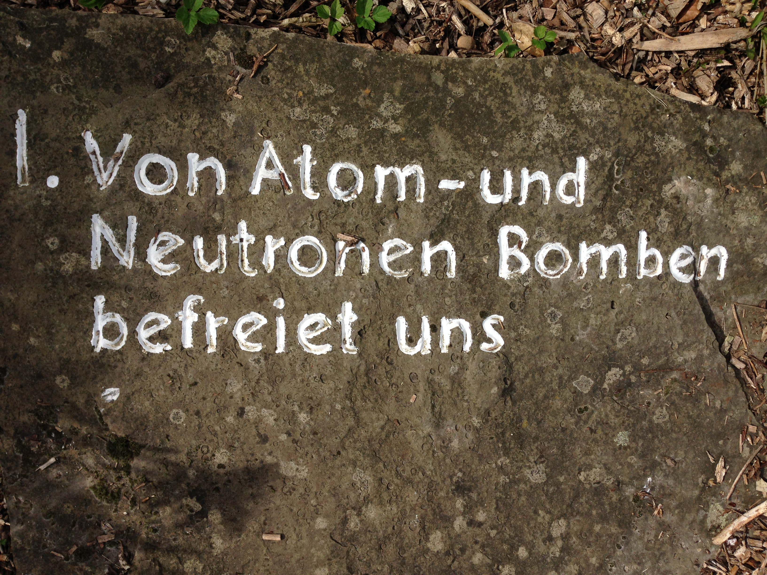 Gebotstafel 1